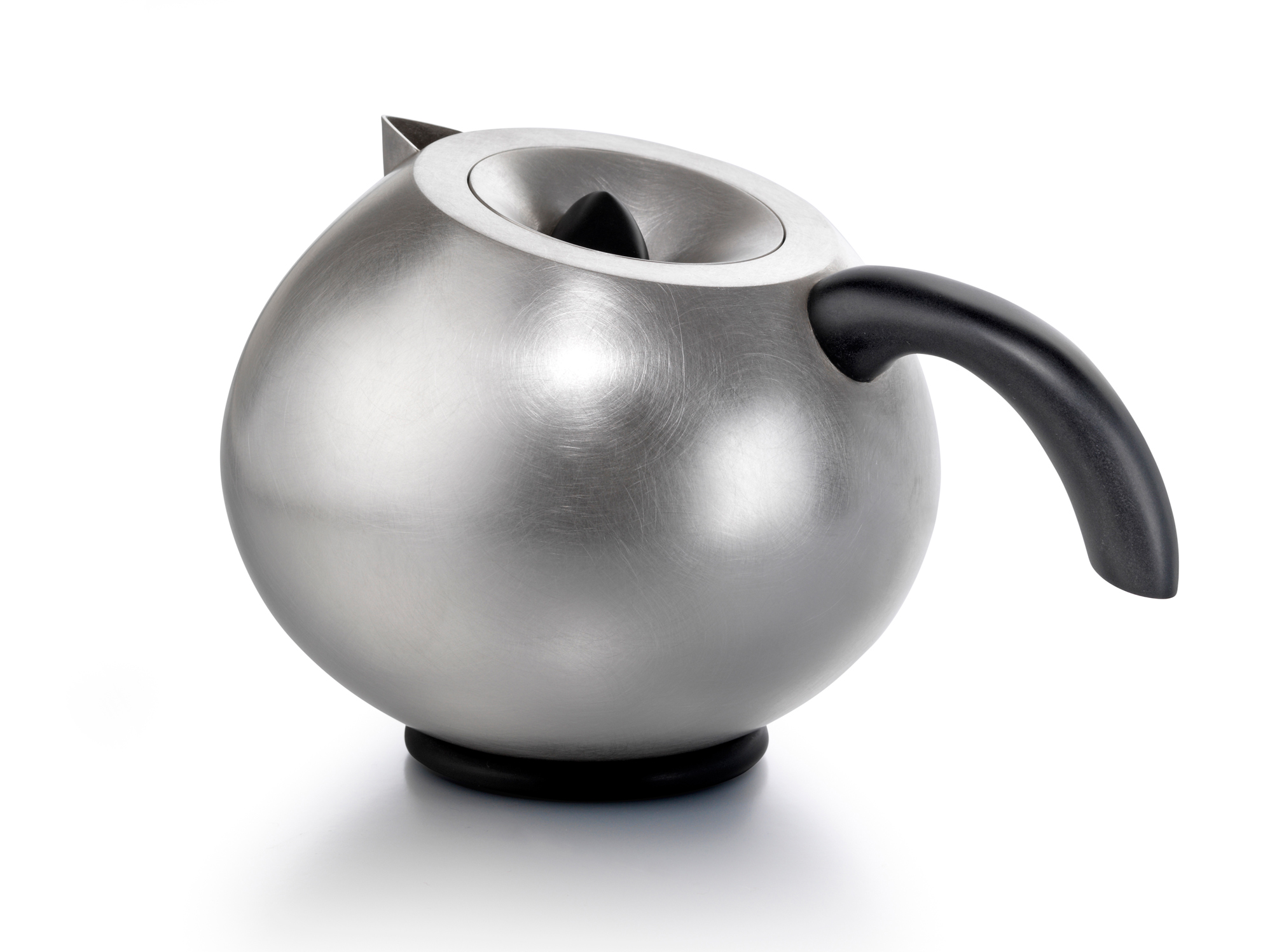 LittleBeakTeapot